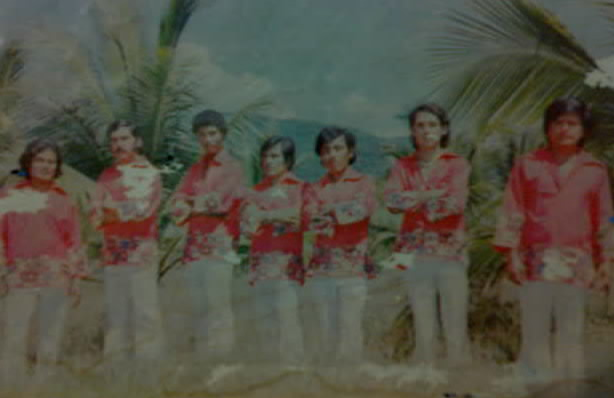 Imagen del Miramar 1976